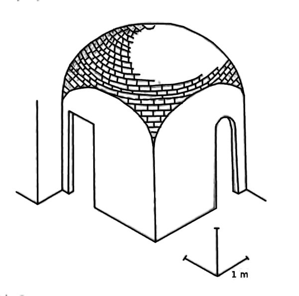 Rekonstruktion der Stutzkuppel in der Mastaba des Seneb, Gizeh, Altes Reich